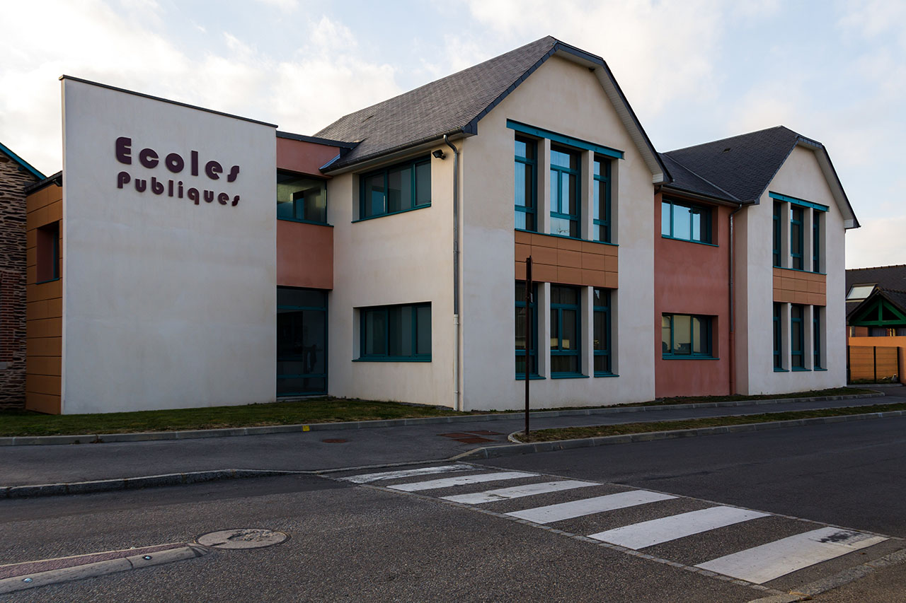 Bâtiment des écoles publiques de Laillé vu de la rue.